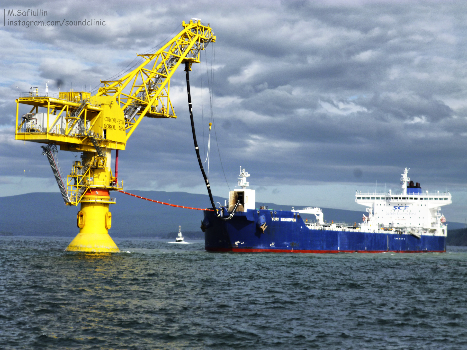 грузовая операция // Oil terminal in De-Kastri port, Russian far east